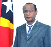 José da Silva Panão, Abgeordneter aus Osttimor